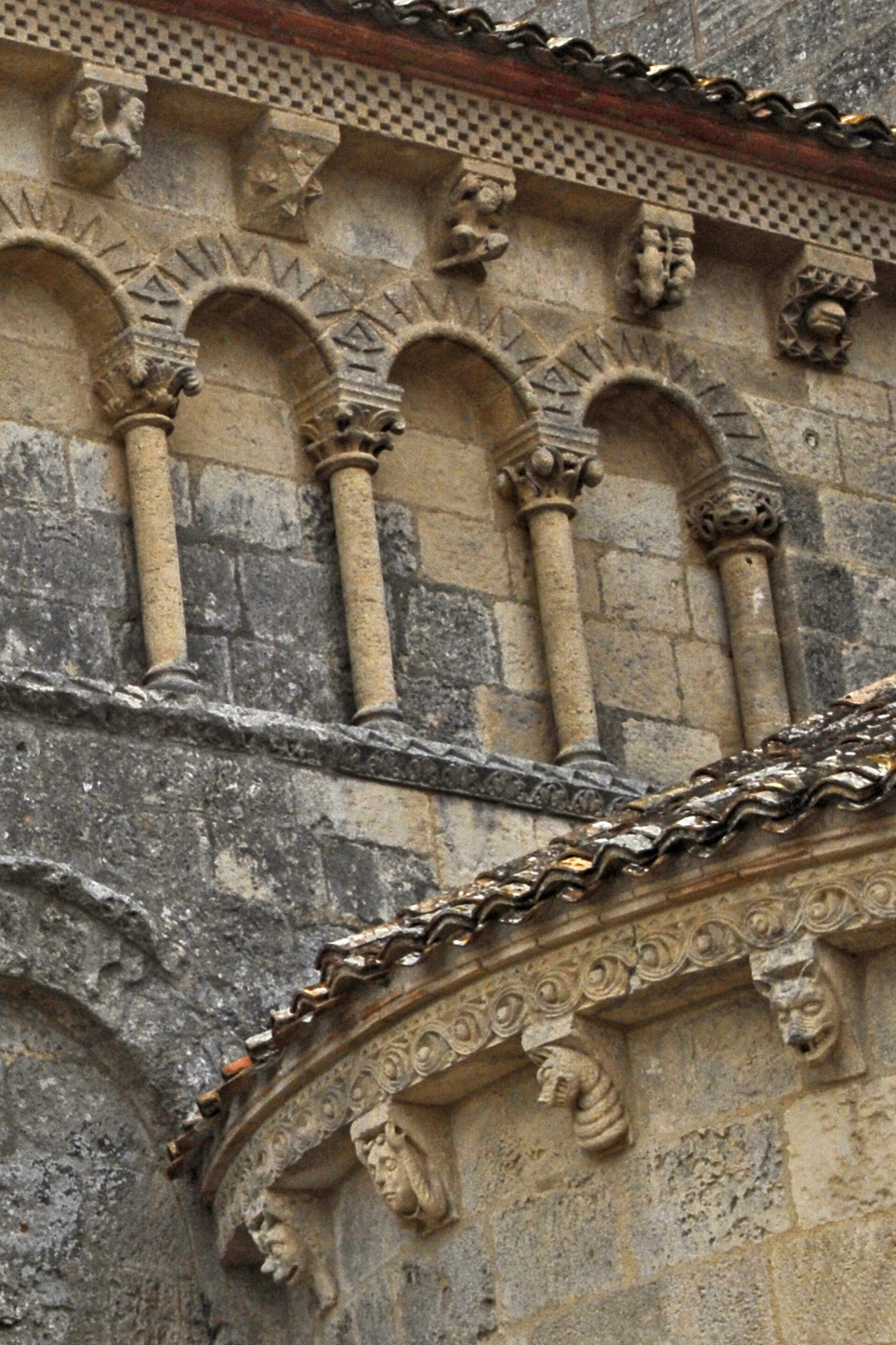 Sainte-Radegonde-Talmont-sur-Gironde, Traufen Chor und Kapelle